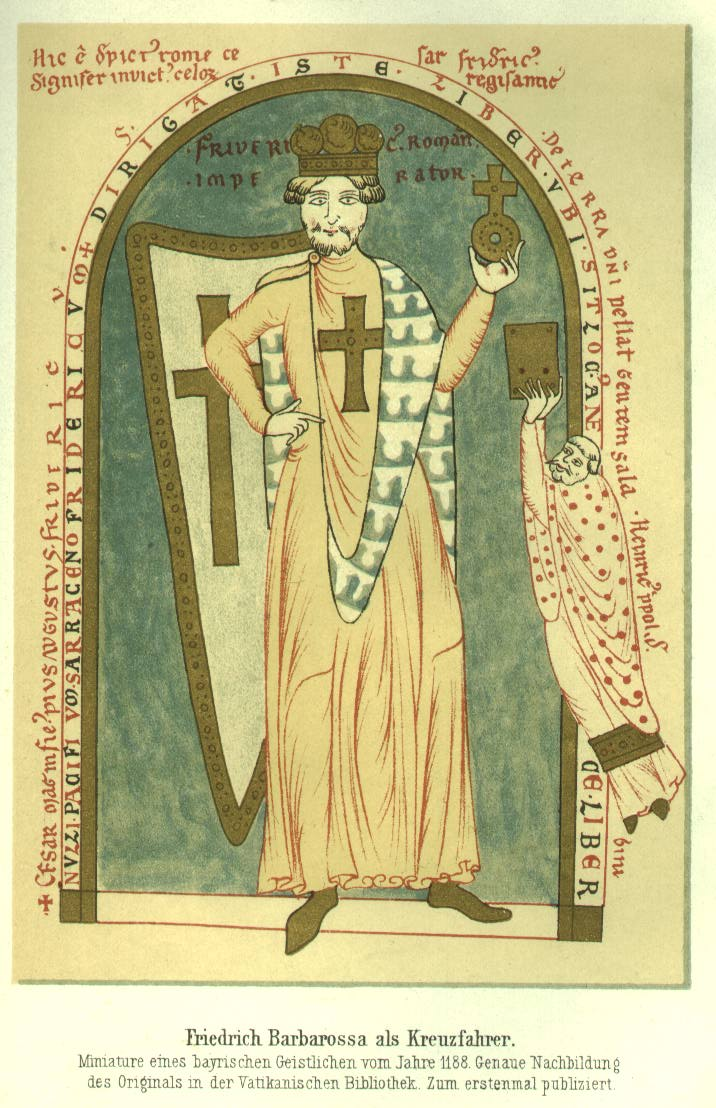 Kaiser Friedrich I. als Kreuzfahrer